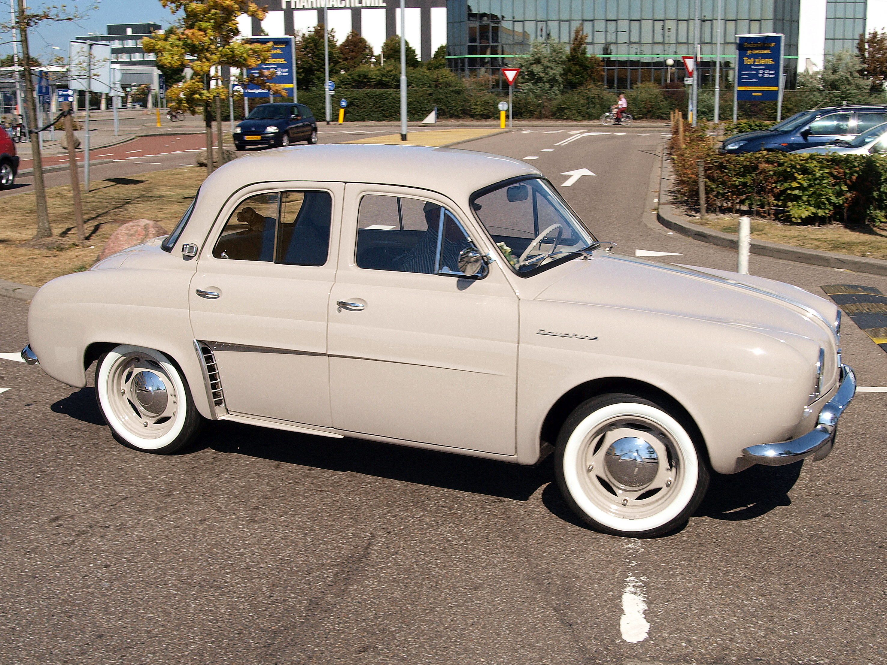 Renault Dauphine DE-89-92